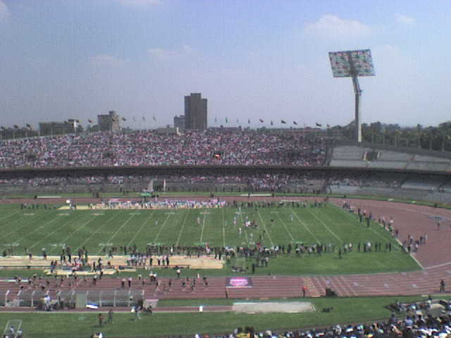 Foto del partido de play off Pumas vs Águilas Blancas